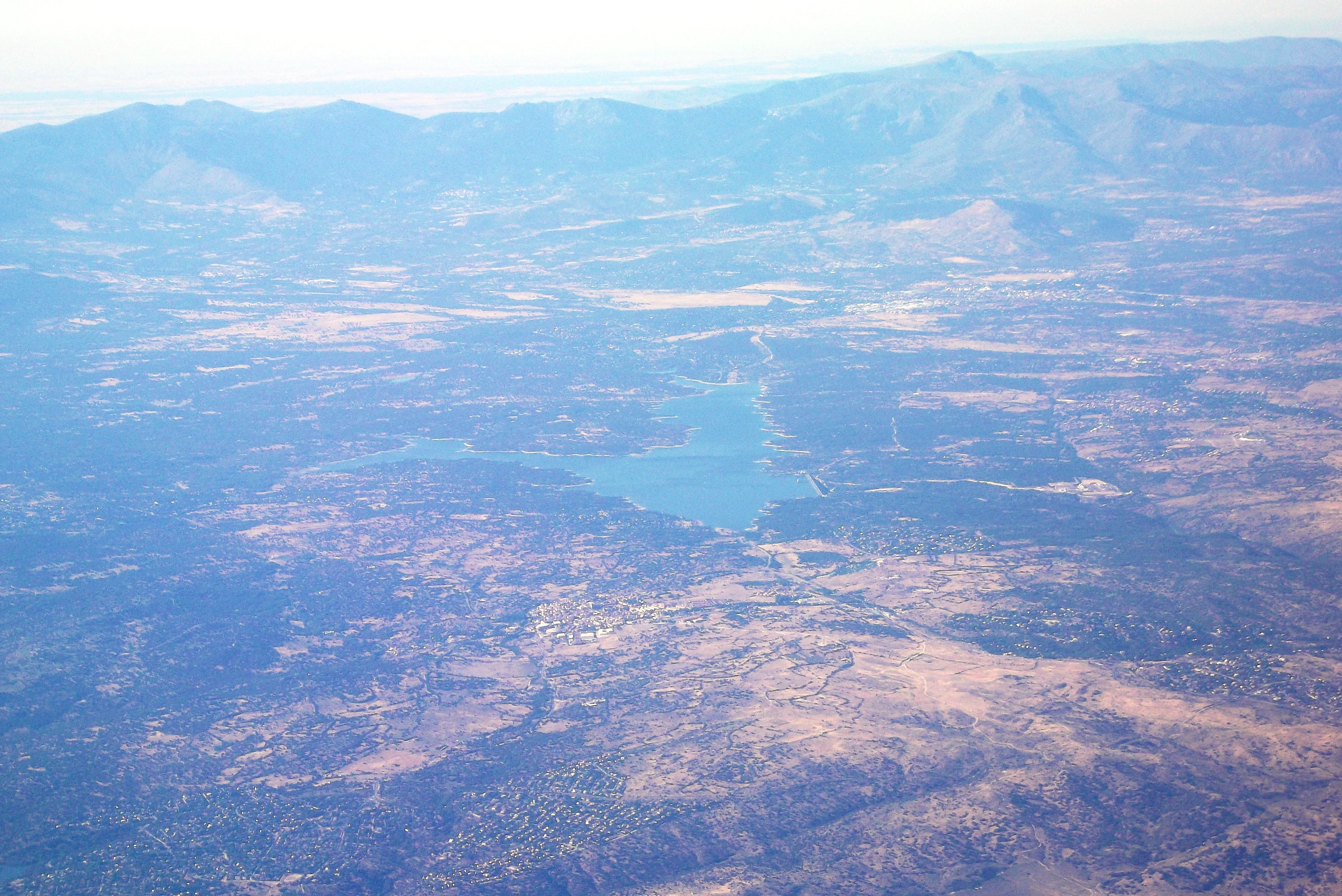 Embalse de Valmayor desde el aire.